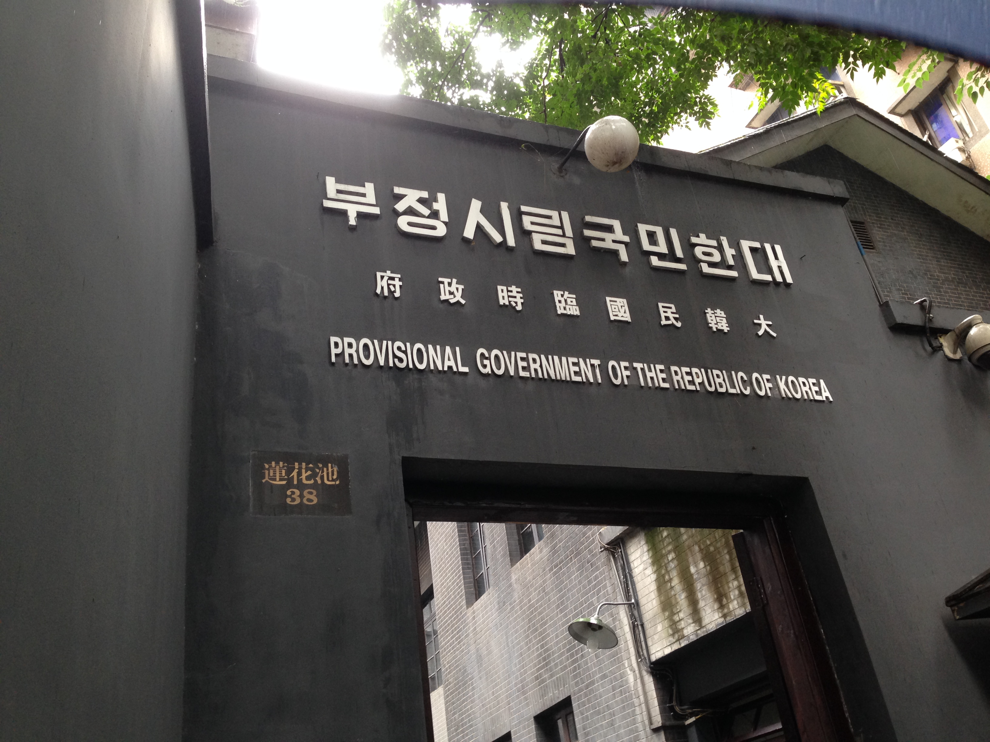 重慶大韓民國臨時政府陳列館大門